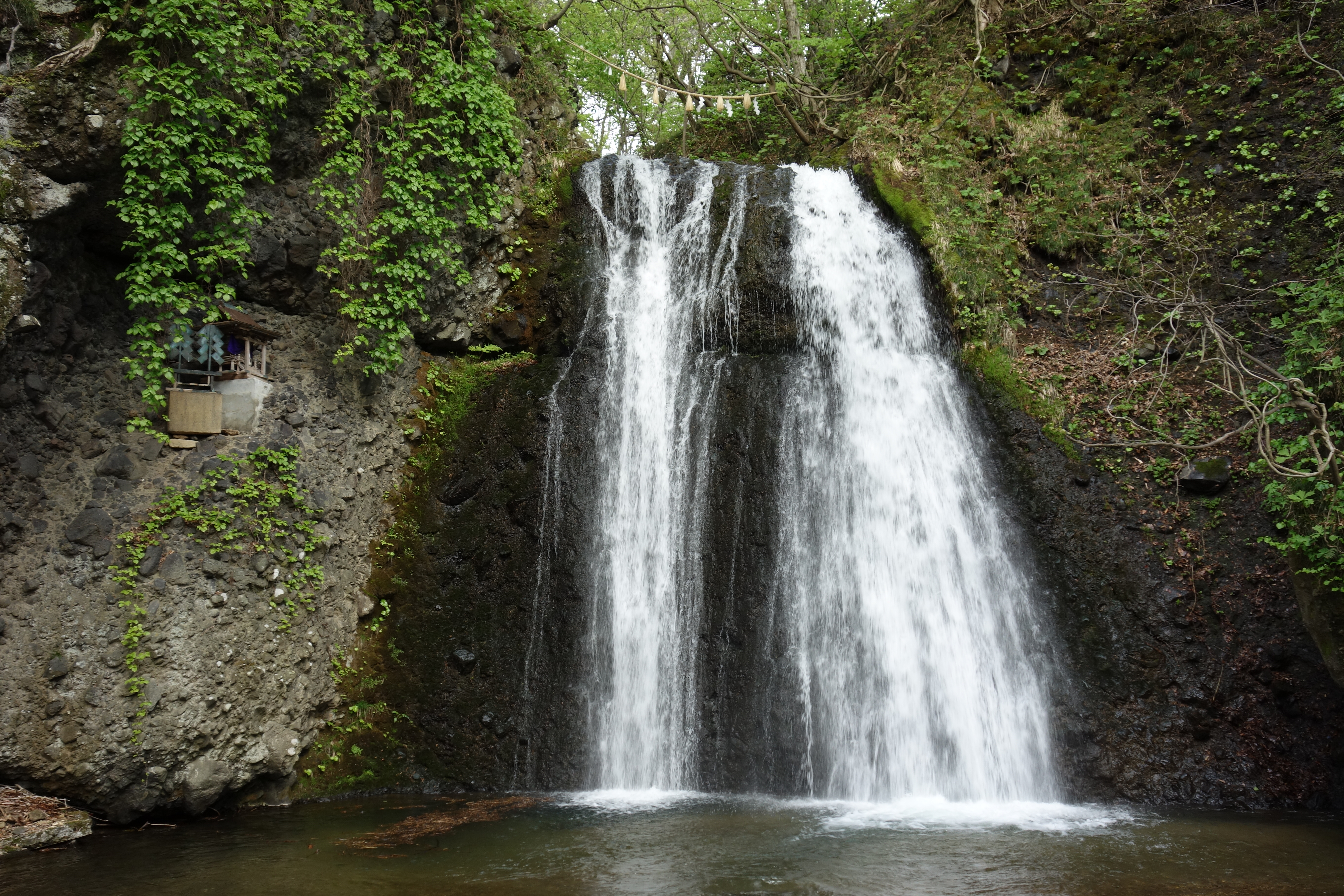 白瀑神社の滝 「白瀑」 右が男滝、左が女滝